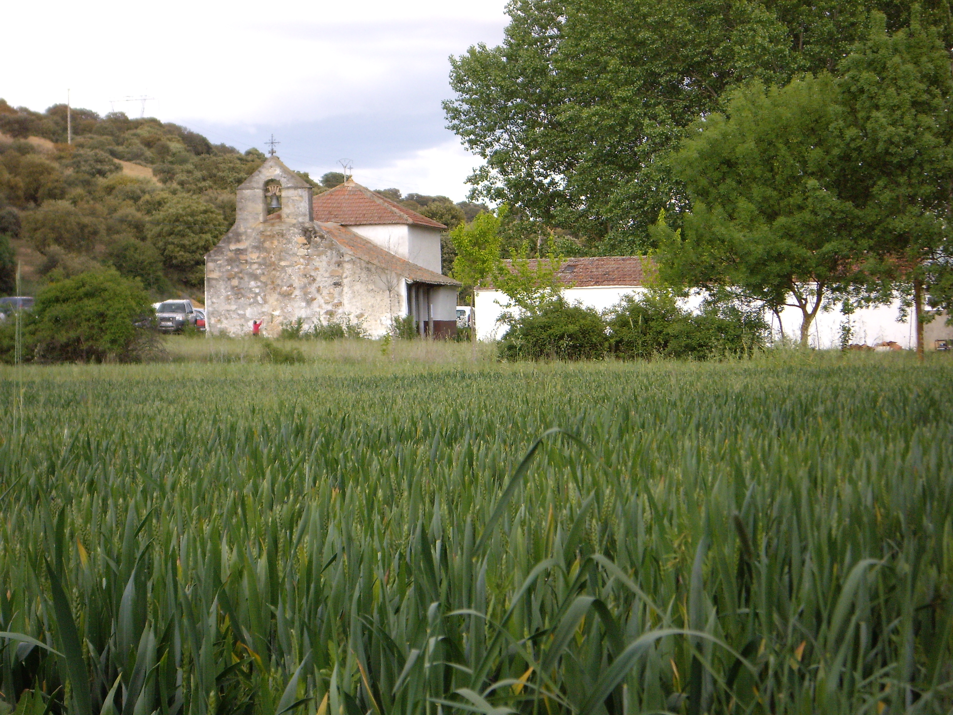 Ermita de la Trinidad de Camarzana de Tera Zamora - España